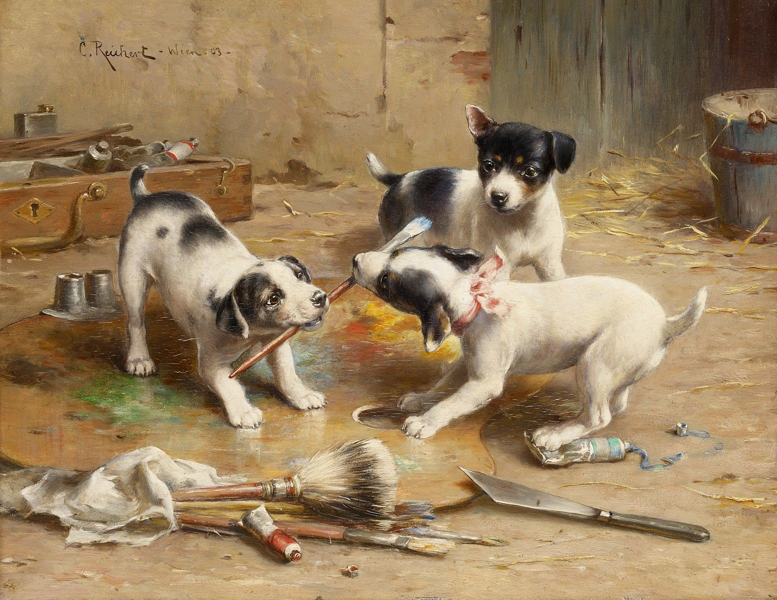 Der Malerstreit